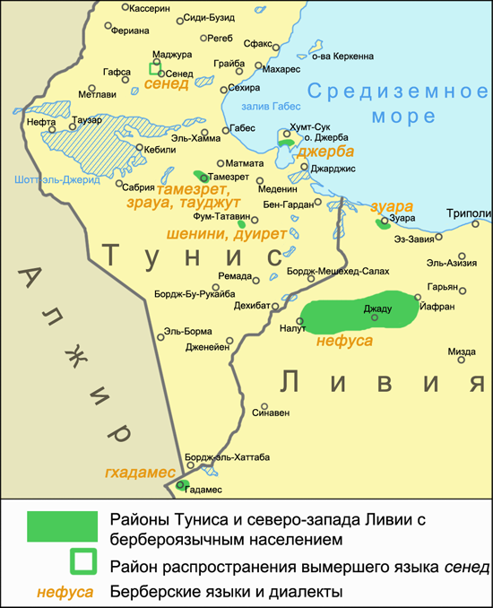 Карта распространения берберских языков Туниса и северо-запада Ливии. Источники: Global Mapping International. Steve Huffman Language Maps Le Centre de Recherche Berbere. Le berbere de Djerba (Tunisie) MultiTree:A Digital Library of Language Relationships. The Nafusi Language Ethnologue. Languages of Libya Ethnologue. Sened. An extinct language of Tunisia Ethnologue. Nafusi. A language of Libya